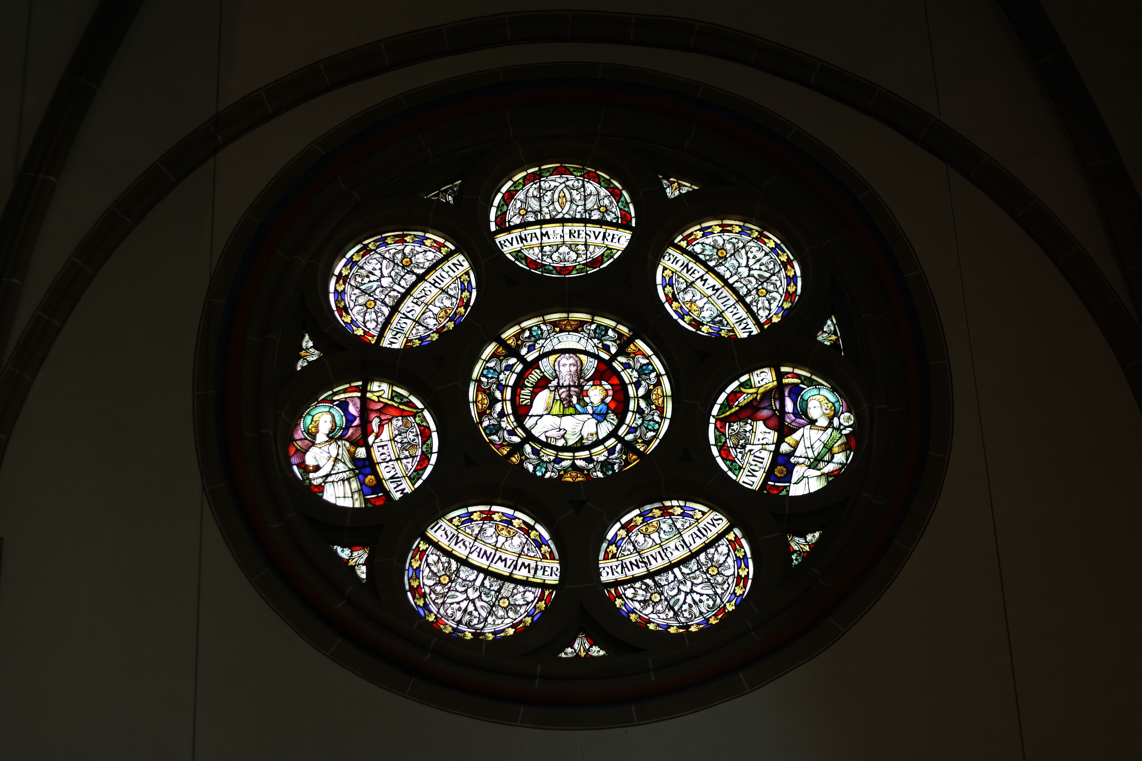 Bleiglasfenster in der katholischen Pfarrkirche in Bad Neuenahr, genannt Rosenkranzkirche